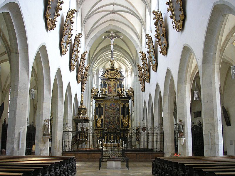 Klosterkirche Kaisheim (Landkreis Donau-Ries, Bayern). Der Innenraum nach Osten. Eigene Aufnahme, Juli 2006 / Abbey church Kaisheim near Donauwoerth, Bavaria, Germany. Looking east towards the choir. Own photo, July 2006